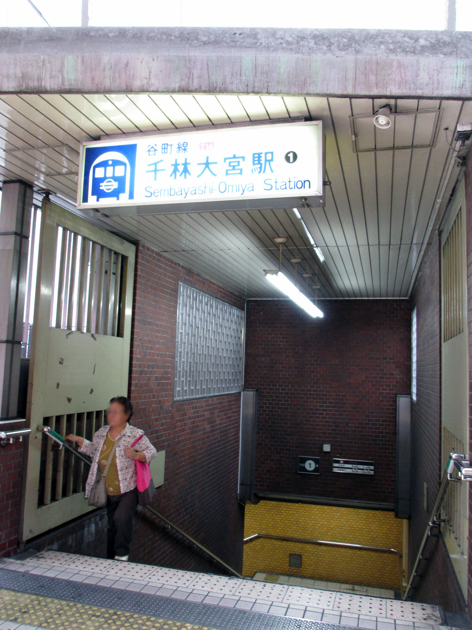 Senbayashi Shopping street